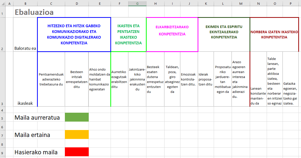 Ikastetxe batean zenbait konpetentzia baloratzeko sortutako kalkulu-orri baten zati baten pantaila-argazkia